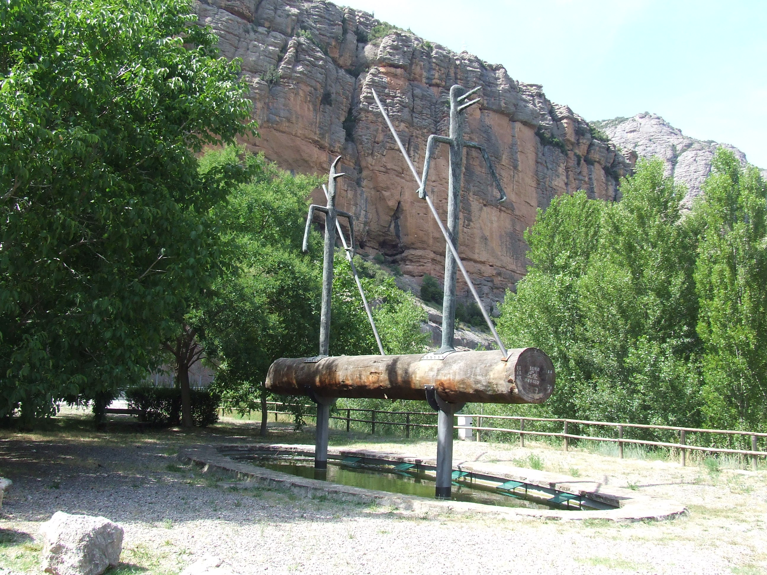 Monument als raiers a Collegats (la Pobla de Segur, Pallars Jussà)